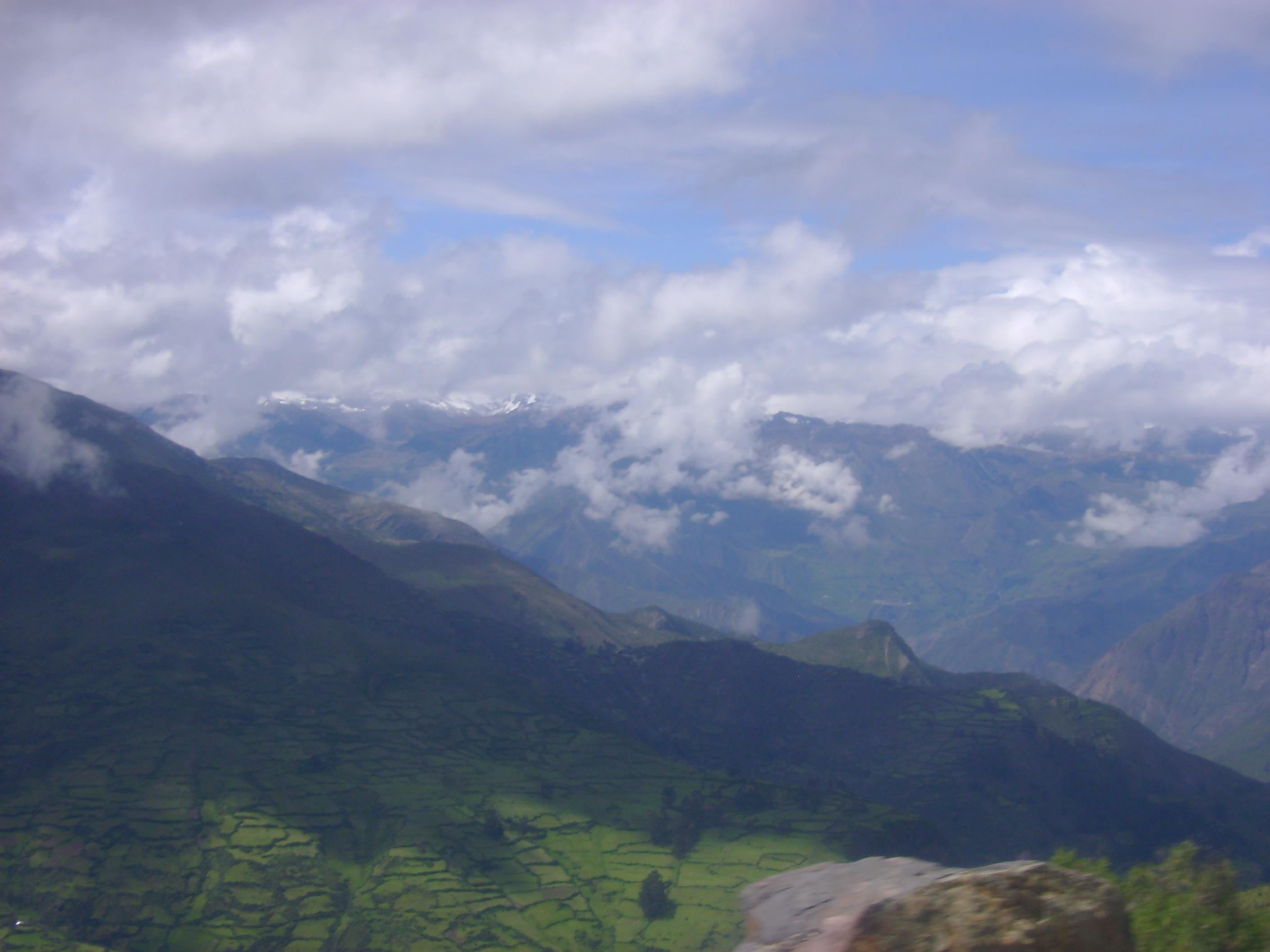 Cordillera Huayhuash nublado.